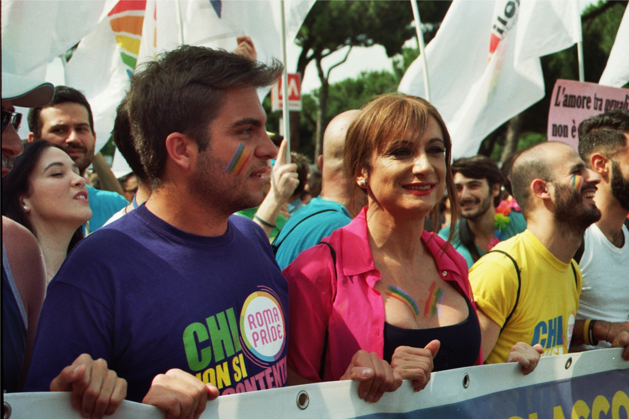 Mario Colamarino, president of Circolo Mario Mieli, and Vladimir Luxuria at 2016 Roma Pride